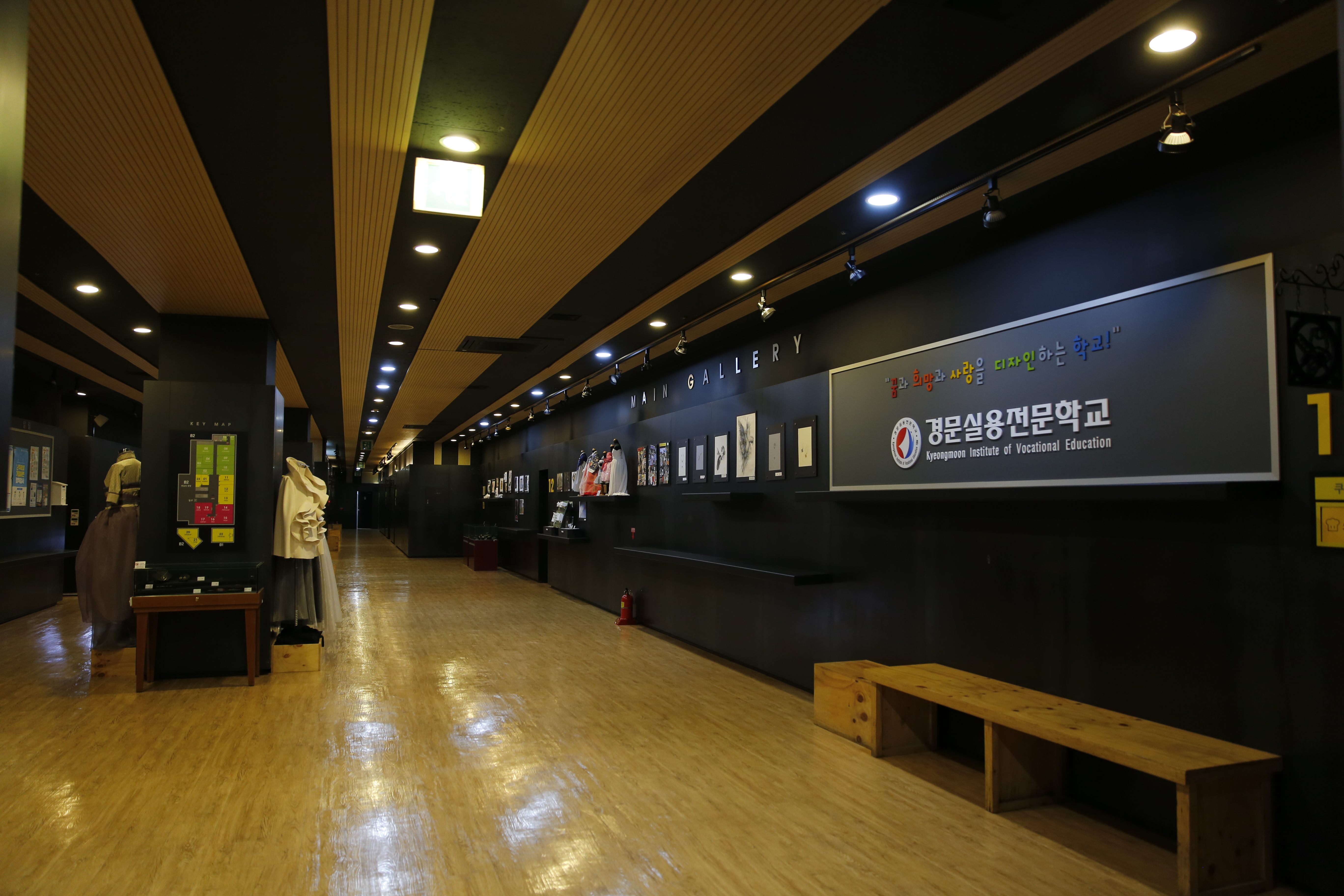 경문실용전문학교 시설